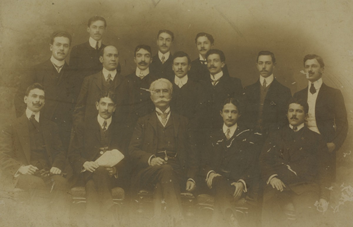 Joaquim Nabuco e o Diretório Acadêmico XI de Agosto, da Faculdade de Direito de São Paulo, 1906. Da esquerda para a direita, sentados: Fernando Lara Palmeiro, César Lacerda de Vergueiro, Joaquim Nabuco, Heitor de Moraes, João Quartim Barbosa; em pé, na primeira fila: René Thiollier, Epaminondas Chermont, A. Flores Júnior, Lino Moreira, Tito Lívio Brasil, Nereu O. Ramos, Adolfo Konder; e no alto: Victor Konder, Firmo Lacerda de Vergueiro e Eduardo Vergueiro de Lorena.